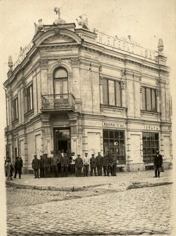 Таганрог. Здание на углу пер. Украинского и ул. Петровской, снесено в 1990 годах